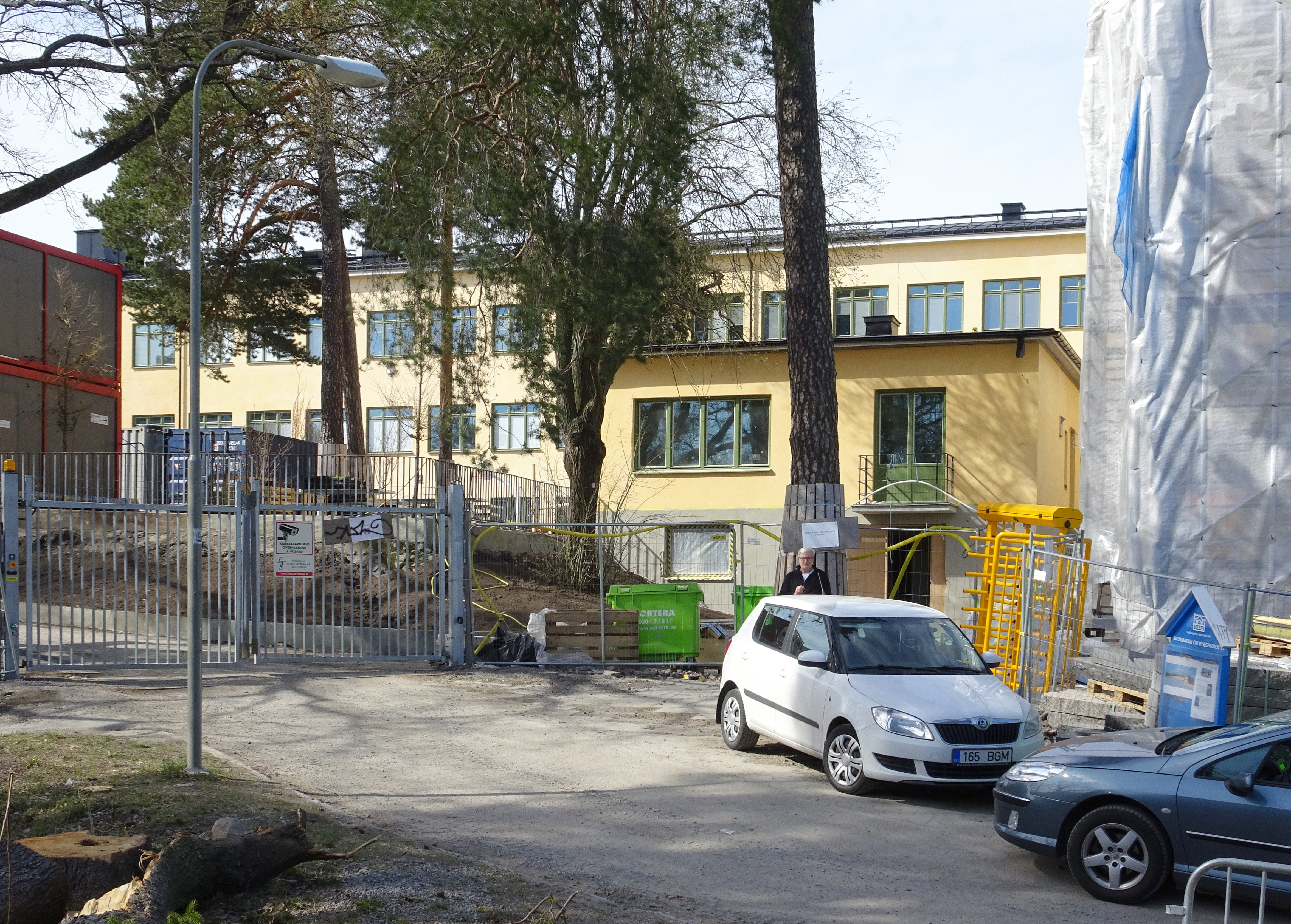 Enskedefältets skola